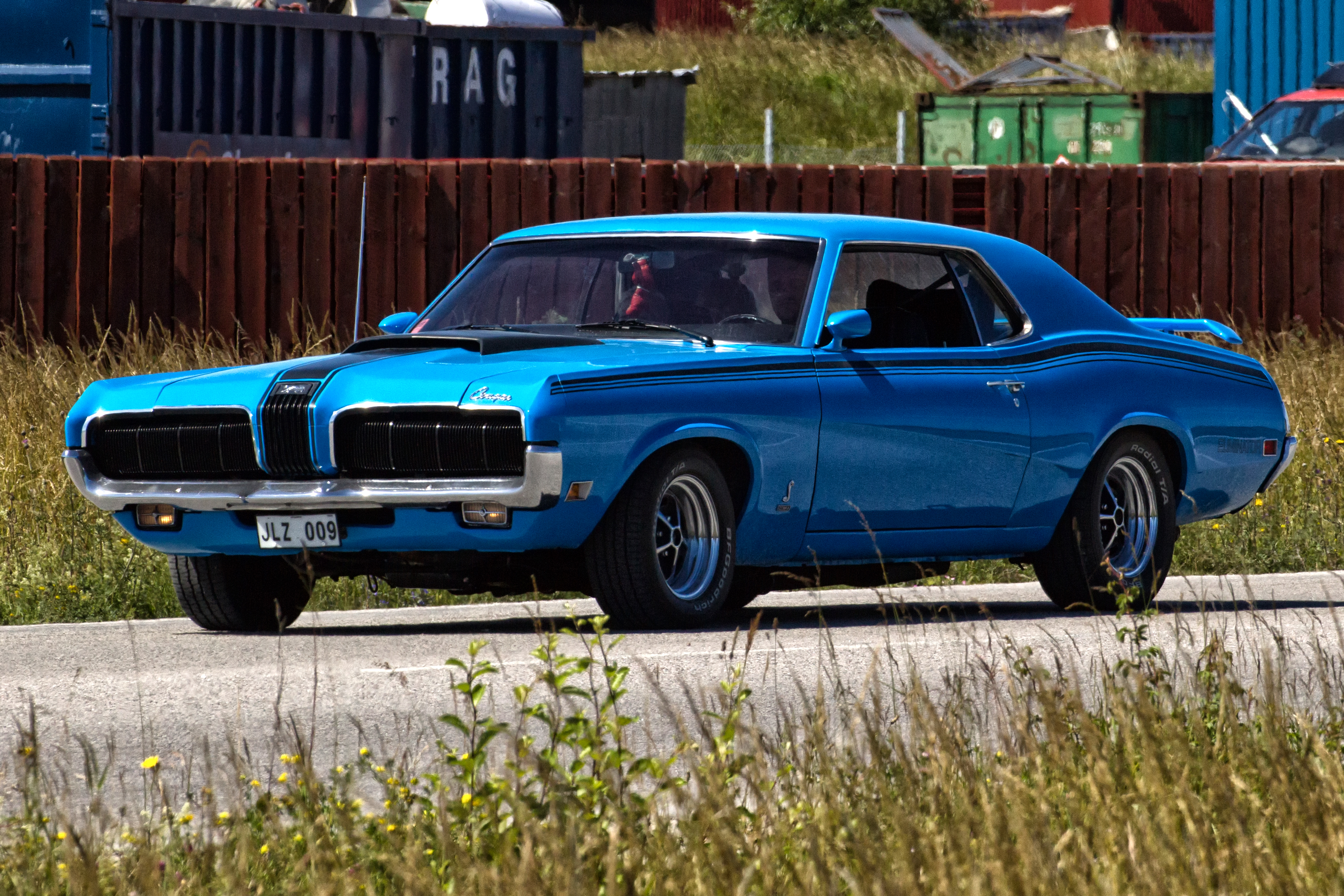 Mercury Cougar en Visby.